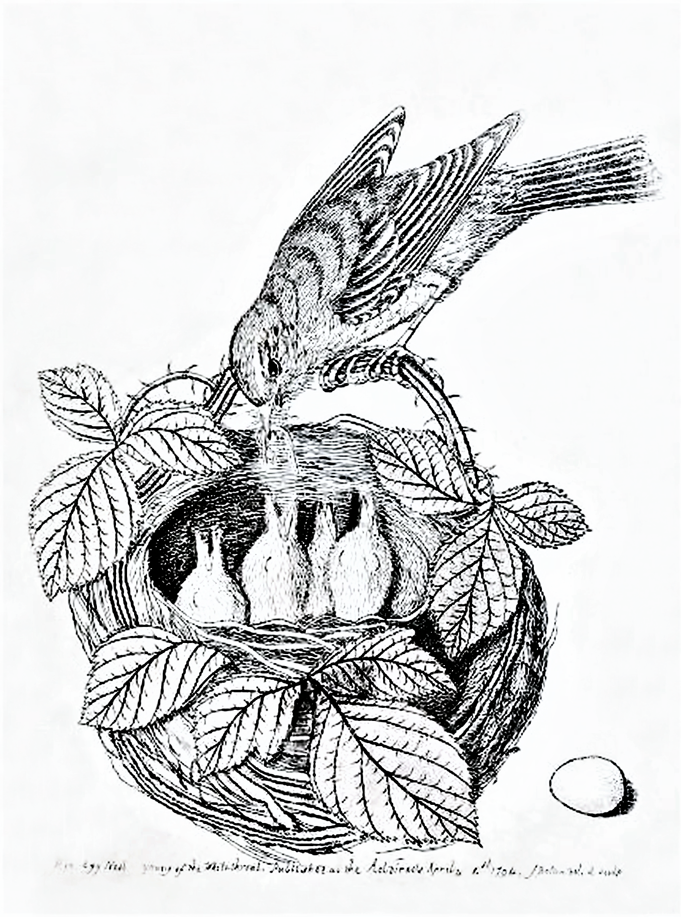 James Bolton: Zonotrichia albicollis (1794)